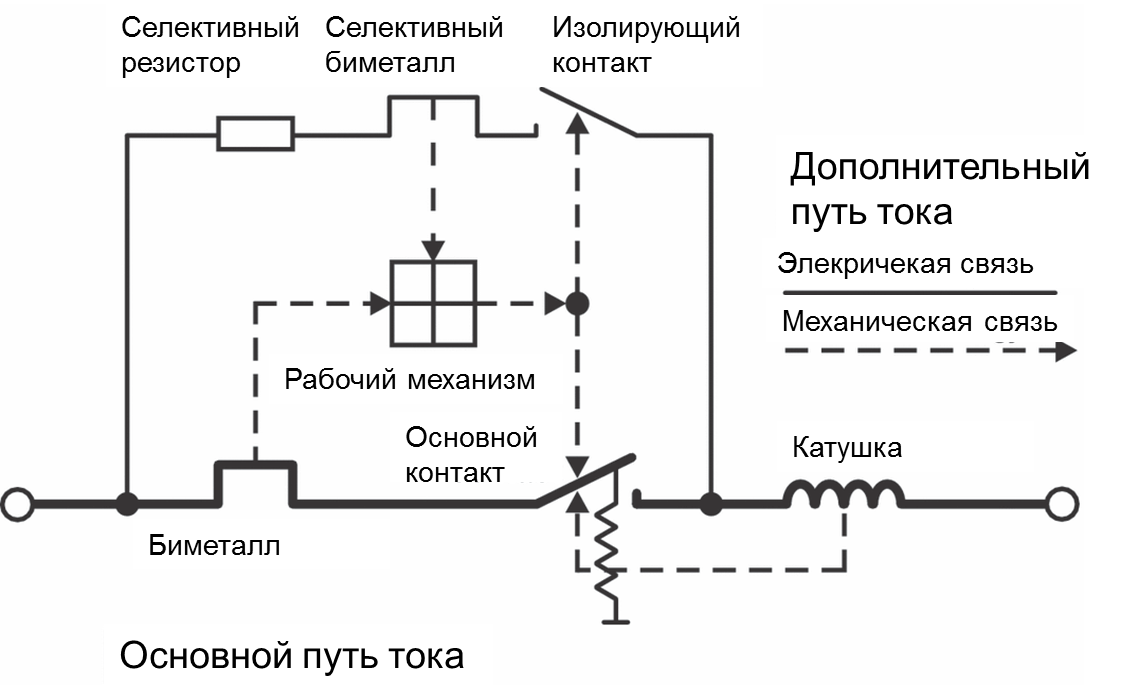 SMCB scheme